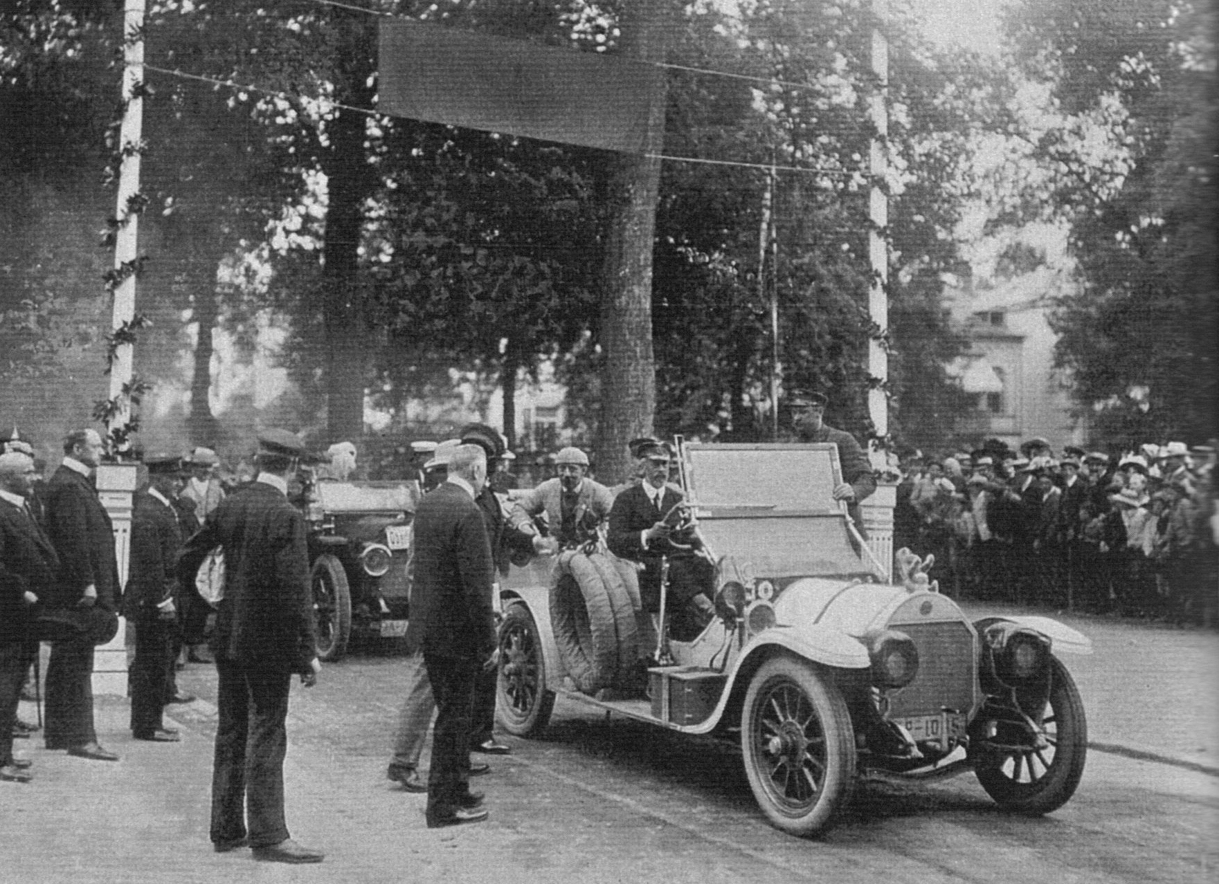 Zie Ankuft von Prinz Heinrich (am Steuer) der Prinz-Heinrich-Fahrt 1910 in Homburg vor der Höhe (Bad Homburg). Wagen ist ein weisser Benz 35/60 Sport Phaeton.